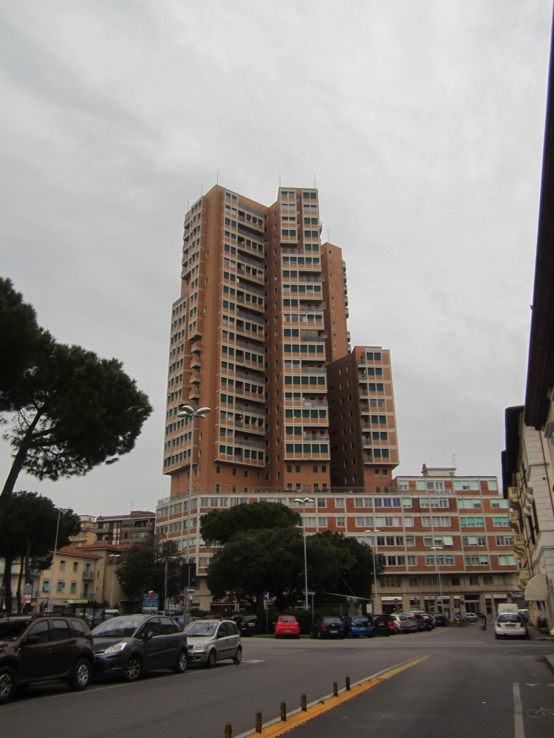 Grattacielo di Livorno